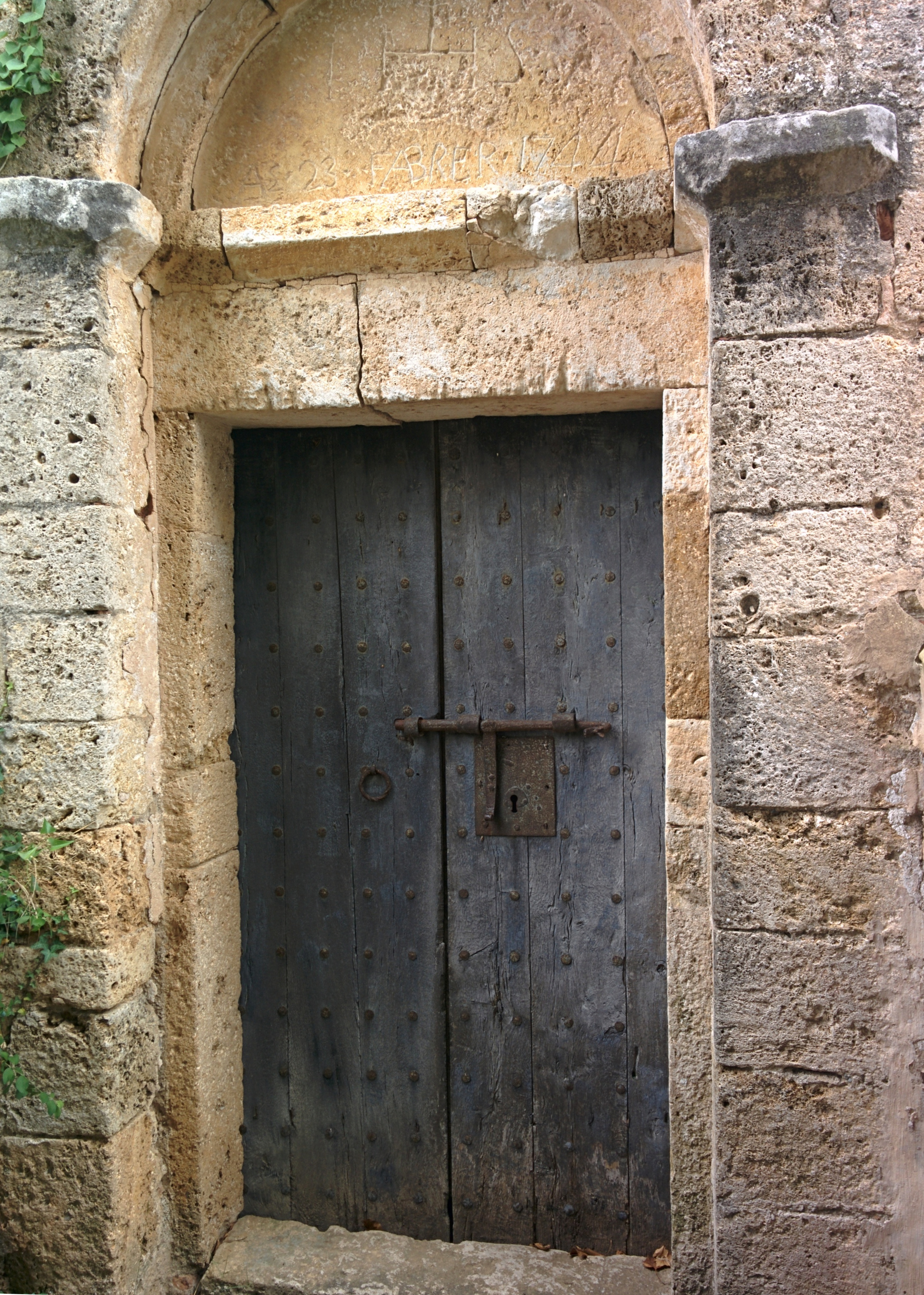 Església dels Sants Just i Pastor (Crespià)